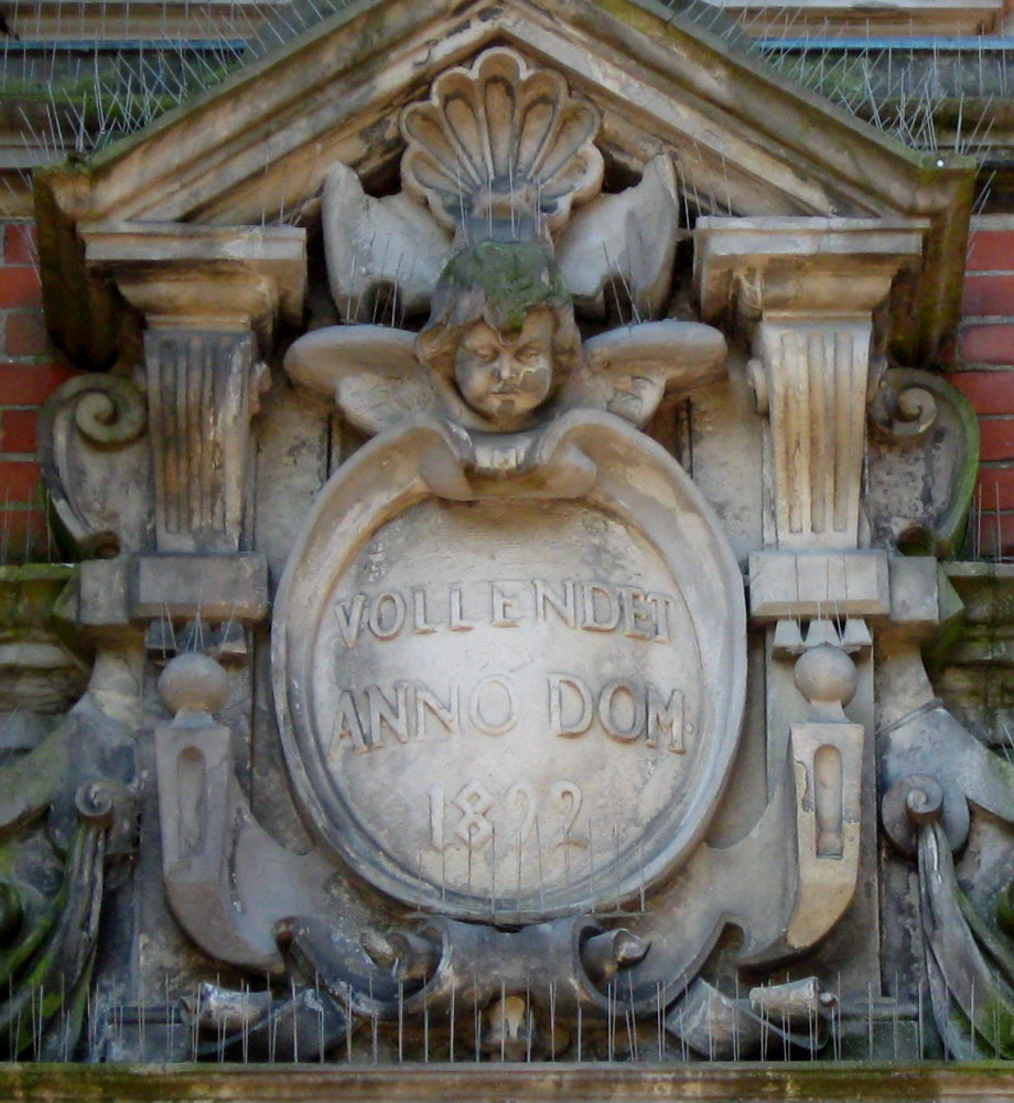 Text am rechten Portalgiebel des Harburger Rathauses (Vollendet Anno Dom 1892)